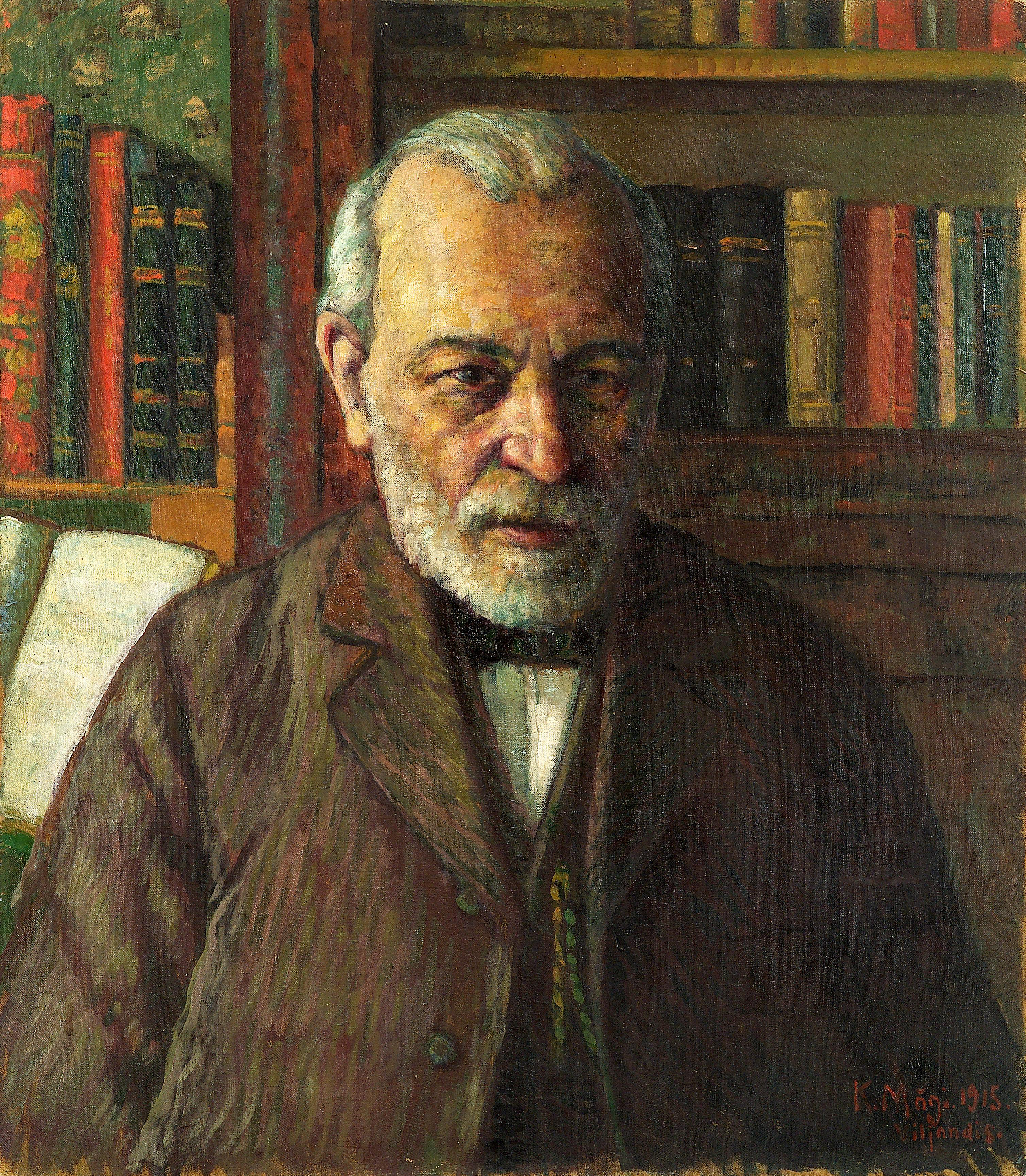 Muuseumikogu Maal Olemus maal Originaal originaal Kunstiese Lisanumbrid foto number: 10387F; foto number: 2517F; negatiivi number: 5980N; negatiivi number: 1224N Säilivus rahuldav